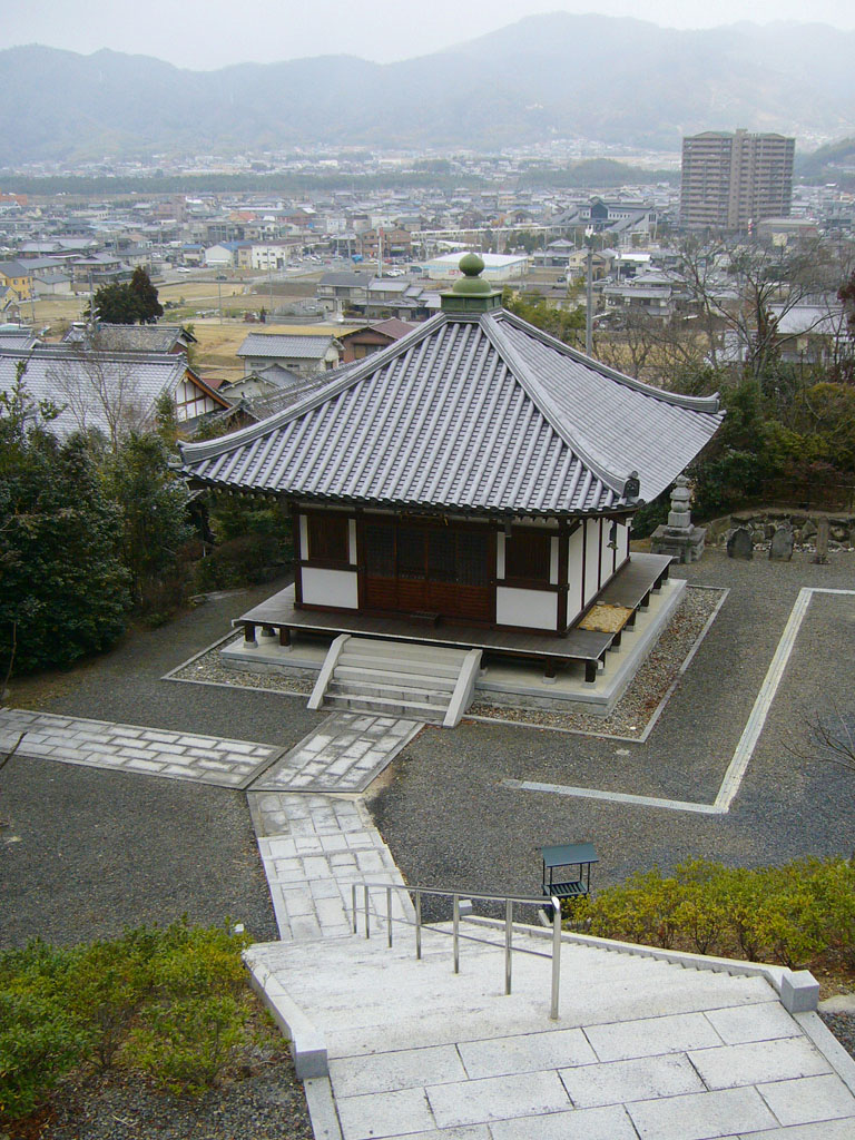 常念寺 舎利堂（京都府相楽郡加茂町）